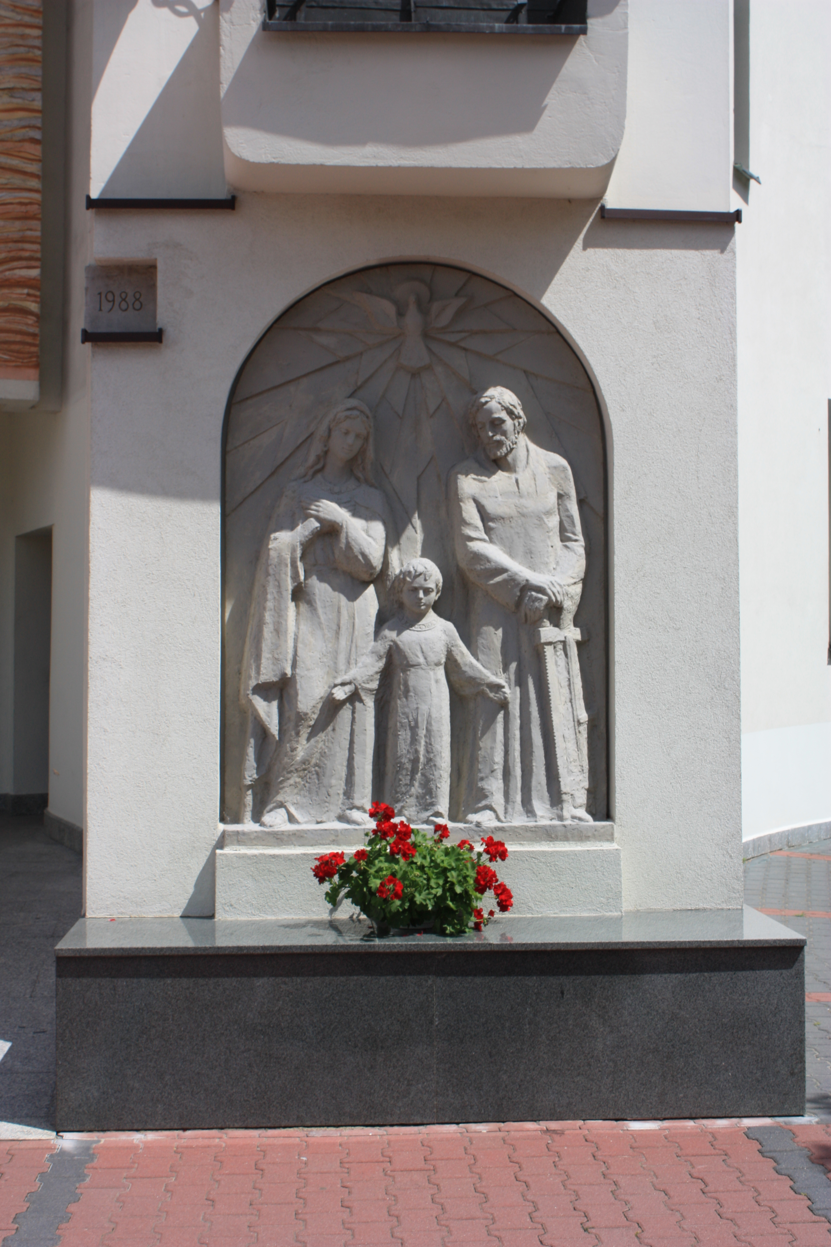 Płaskorzeźba przy fasadzie kościoła Świętej Rodziny w Poznaniu.